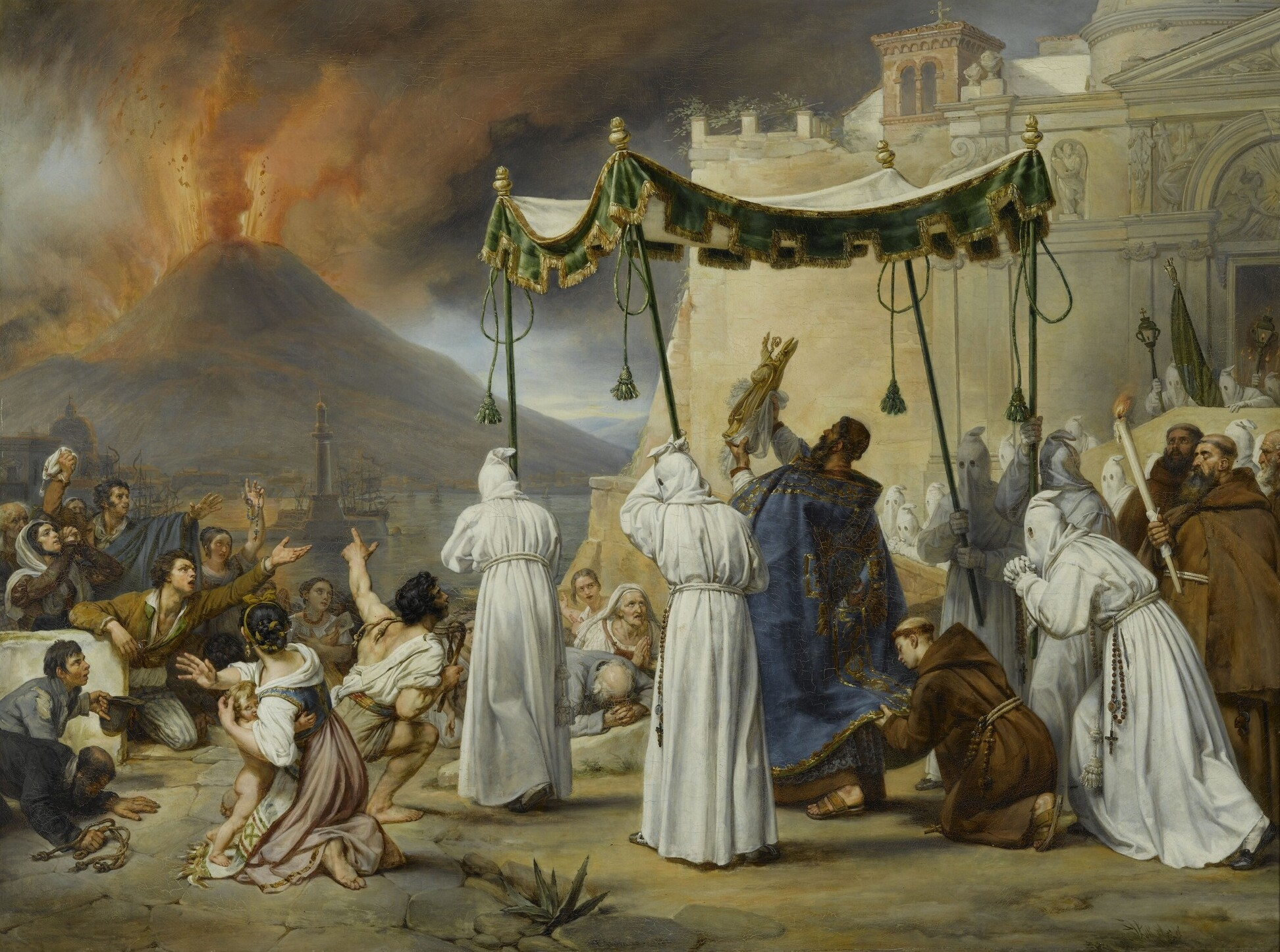 Procession de saint Janvier à Naples pendant une éruption du Vésuve, 1822. Dimensions : 98 x 130 cm ; cadre : 128 x 161,5 x 9 cm. Matière et technique : huile sur toile.